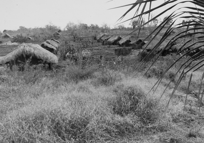 Hondogo was een Ujamaa dorp. Ujamaa is een Swahili term en betekent 'uitgebreide familie', 'familieschap', waarin een individu pas echt mens wordt en goed kan functioneren via de mensen (gemeenschap) om hem heen. Dit principe werd door de president van Tanzania, Julius Nyerere, als basis genomen voor zijn nationale politiek van economische ontwikkeling en hervorming. In 1967 publiceerde Nyerere zijn ideeën als de 'Arusha Declaration' waarin hij de noodzaak van een Afrikaans ontwikkelingsmodel toelichtte wat tevens de basis vormde van het Afrikaanse socialisme.